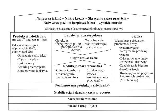 Dom Toyoty przedstawiony w rozprawie doktorskiej